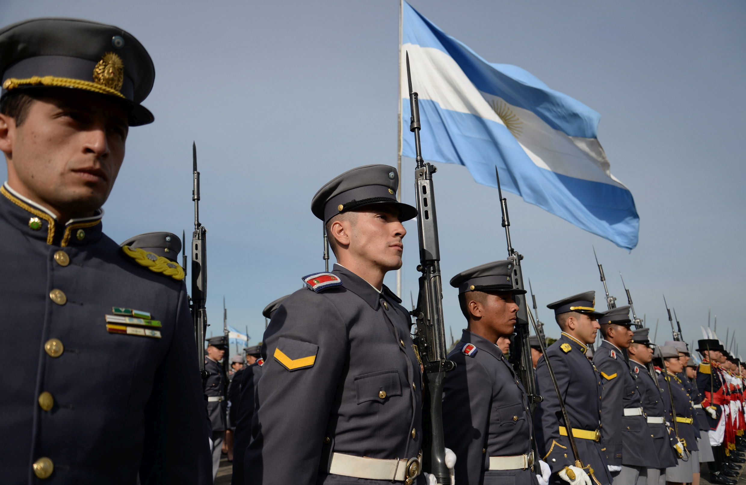 Cadetes de la Escuela de Suboficiales del Ejército «Sargento Cabral» (ESESC).